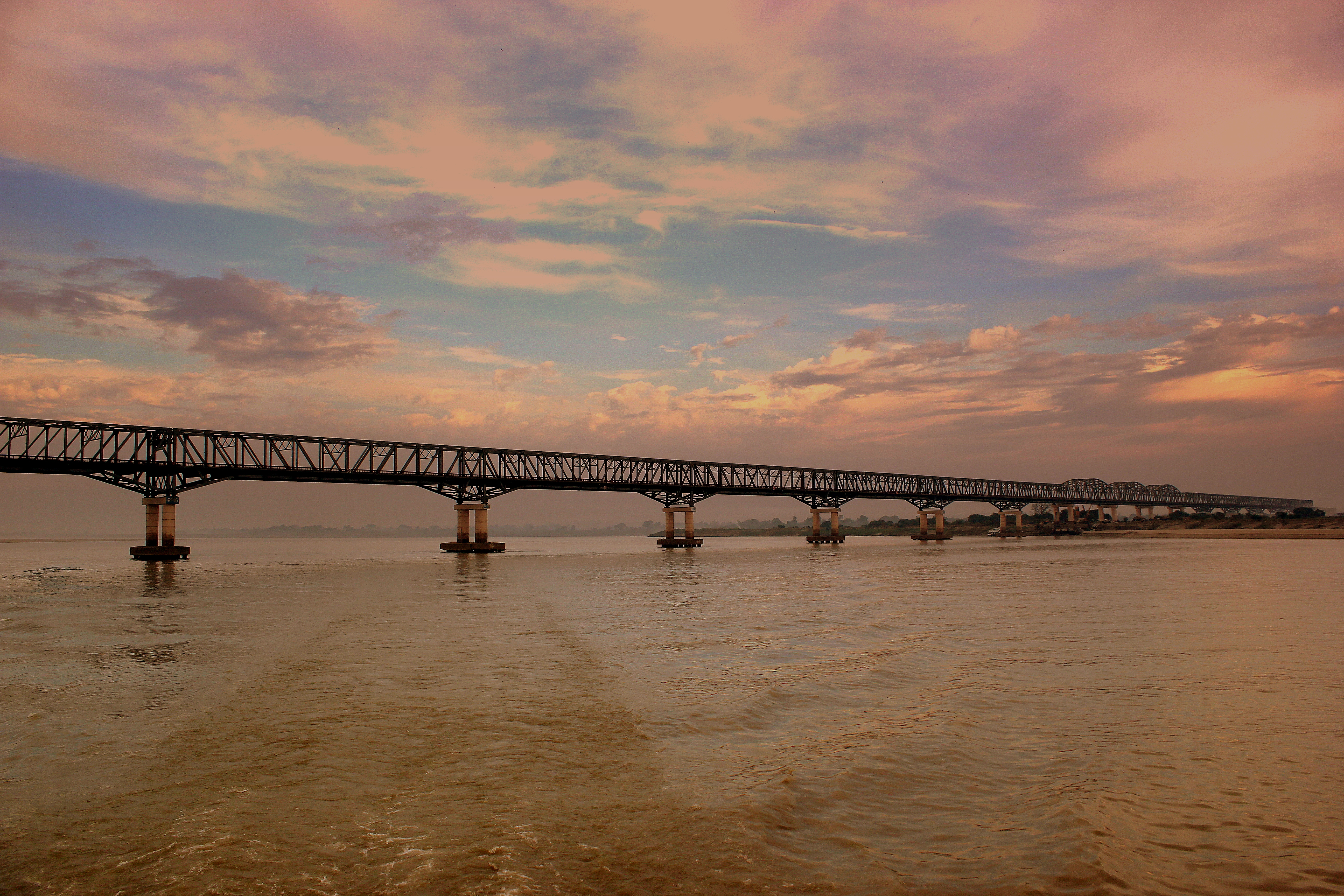 IRRAWADDY FERRY JOURNEY RAILWAY BRIDGE NEAR BAGAN STEAMING TO MANDALAY MYANMA FEB2013